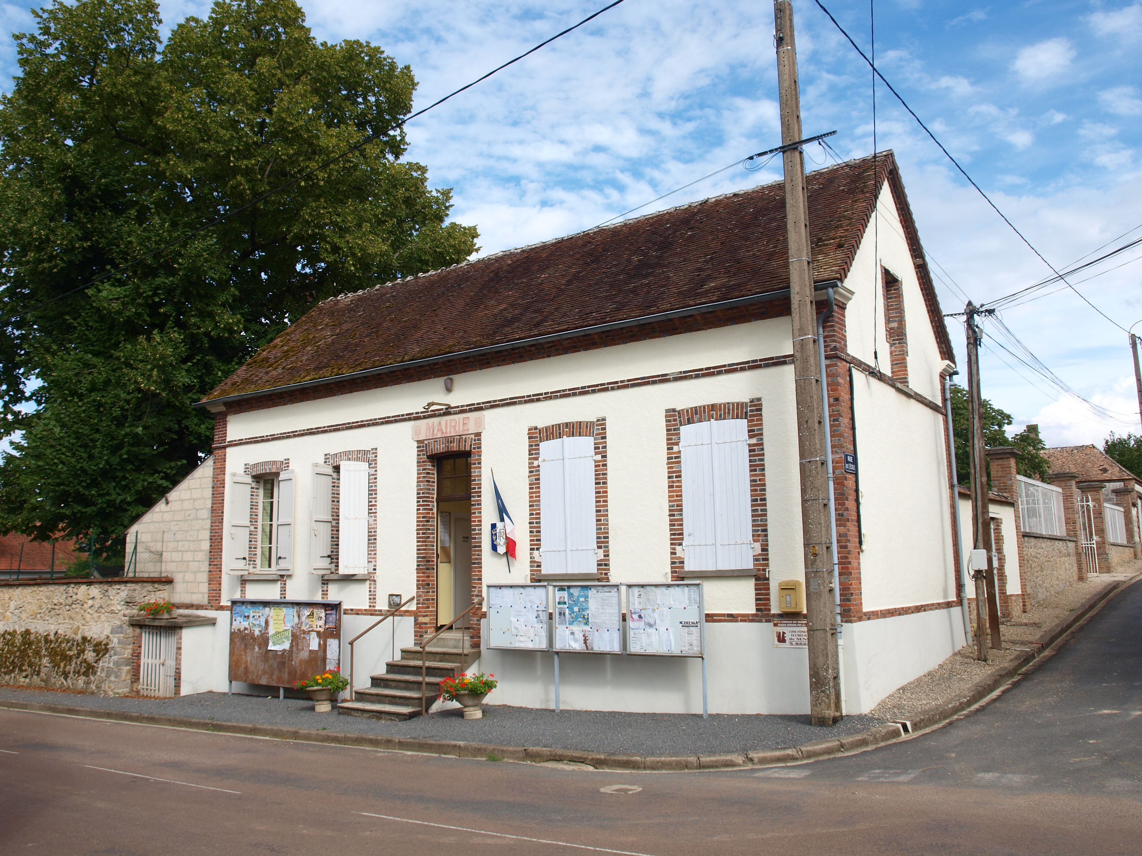 Compigny (Yonne, France) ; mairie